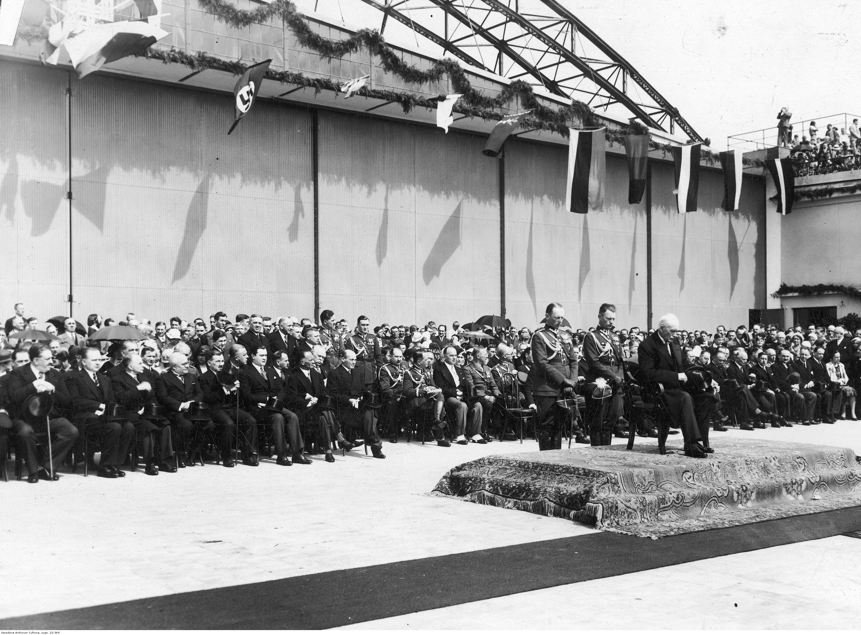 Uczestnicy uroczystości podczas Mszy św. Widoczni: prezydent Ignacy Mościcki (siedzi, na podeście); w pierwszym rzędzie z lewej strony siedzą od prawej: premier Janusz Jędrzejewicz, marszałek sejmu Kazimierz Świtalski, wojewoda warszawski Stanisław Twardo, minister spraw wewnętrznych Bronisław Pieracki, komisarz Rządu na m.st. Warszawę Władysław Jaroszewicz, minister skarbu Władysław Marian Zawadzki, minister pracy i opieki społecznej Stefan Hubicki, minister komunikacji Michał Butkiewicz, minister poczt i telegrafów Emil Kaliński, wiceminister spraw zagranicznych Jan Szembek. Z prawej strony siedzą przedstawiciele dyplomacji. Za prezydentem stoją jego adiutanci: kapitan Zygmunt Gużewski (z lewej) oraz kapitan Józef Hartman (z prawej). W głębi widoczny także m.in. zastępca szefa Gabinetu Wojskowego Prezydenta RP, mjr Kazimierz Jurgielewicz (stoi na prawo za premierem Jędrzejewiczem).